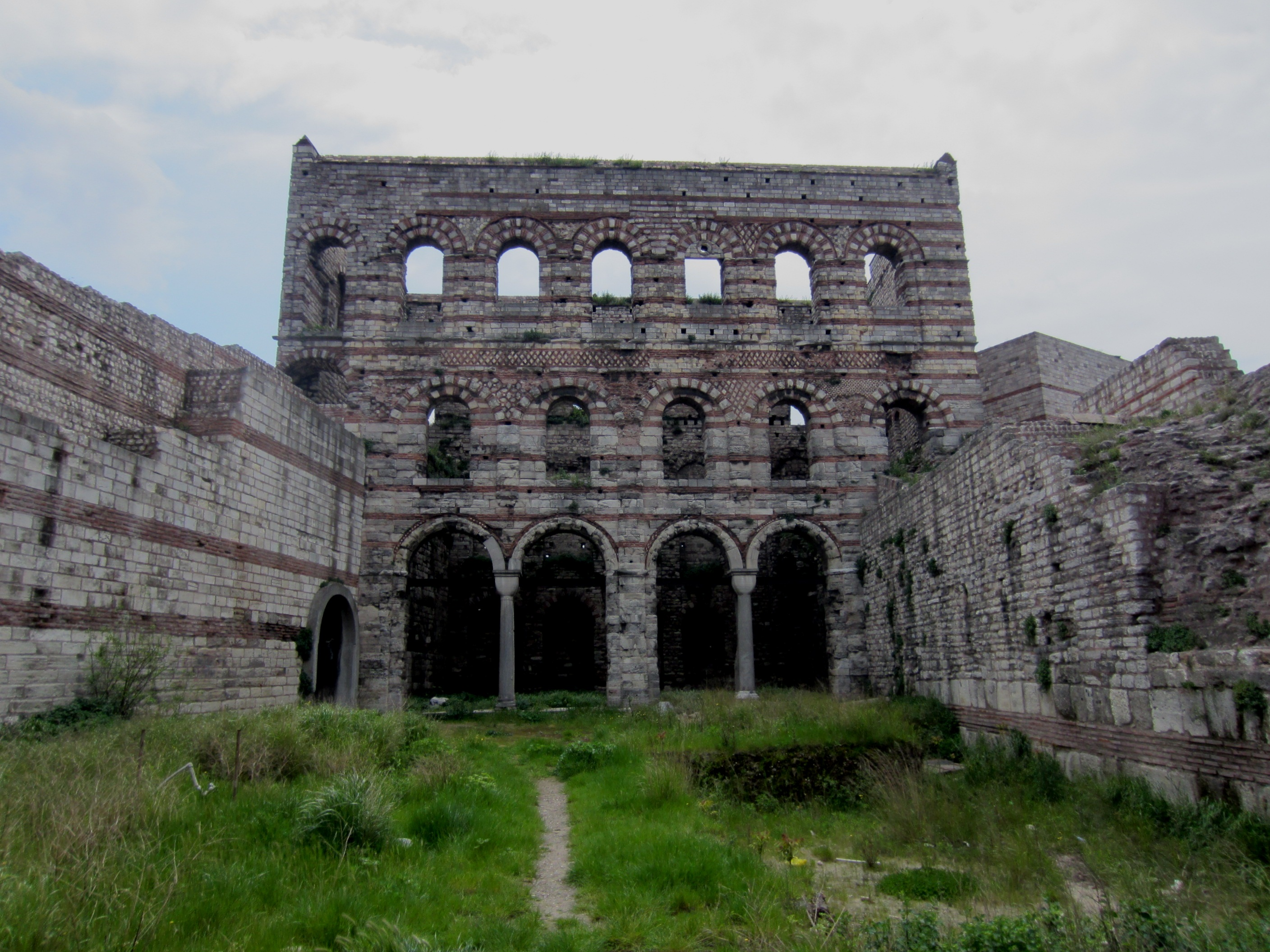 Tekfur Sarayı (Palast des Kaisers), Istanbul